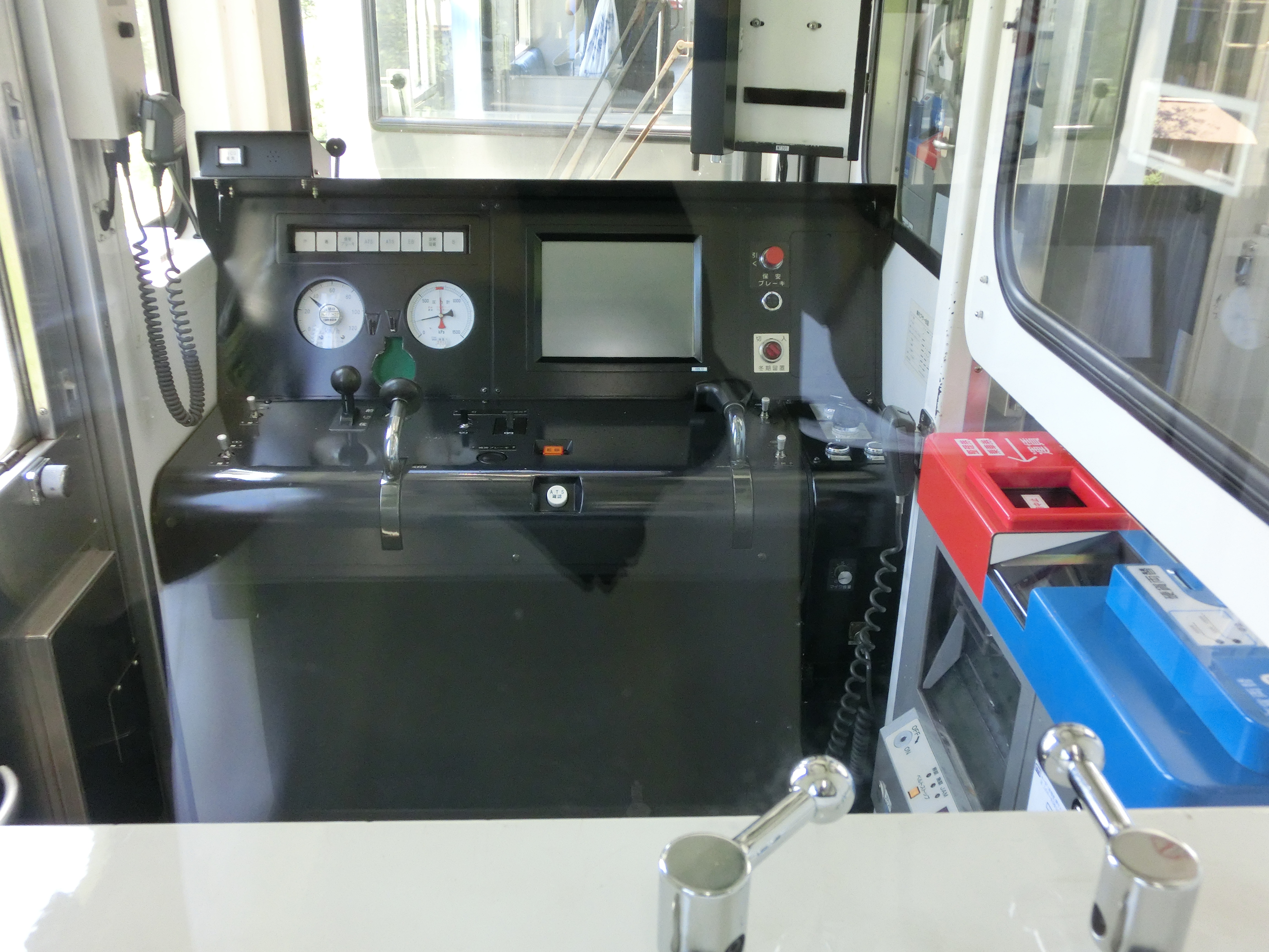 のと鉄道NT200形気動車のNT201号車の運転台。